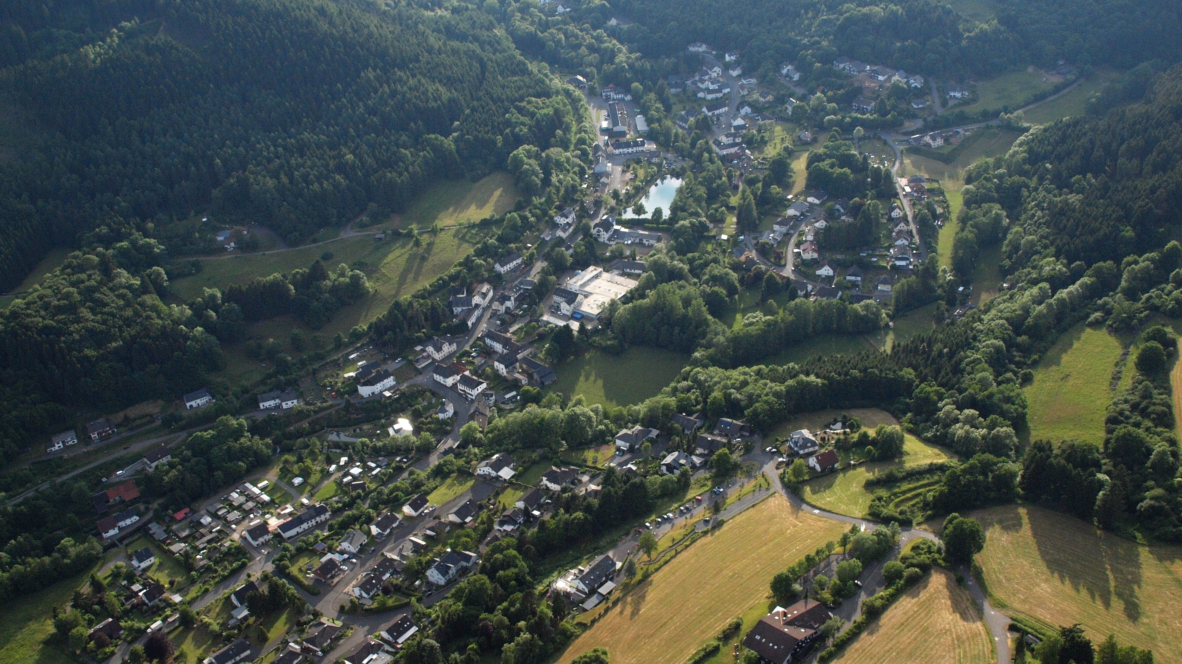 Müllenborn (Gerolstein), Luftaufnahme (2015)